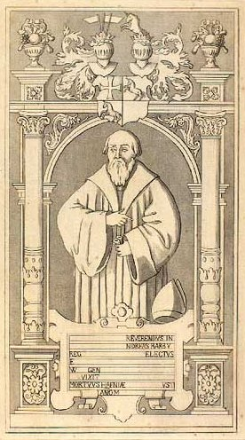 Zeichnung des Epitaphs des Lübecker Bischofs Andreas Barby im Dom zu Roskilde